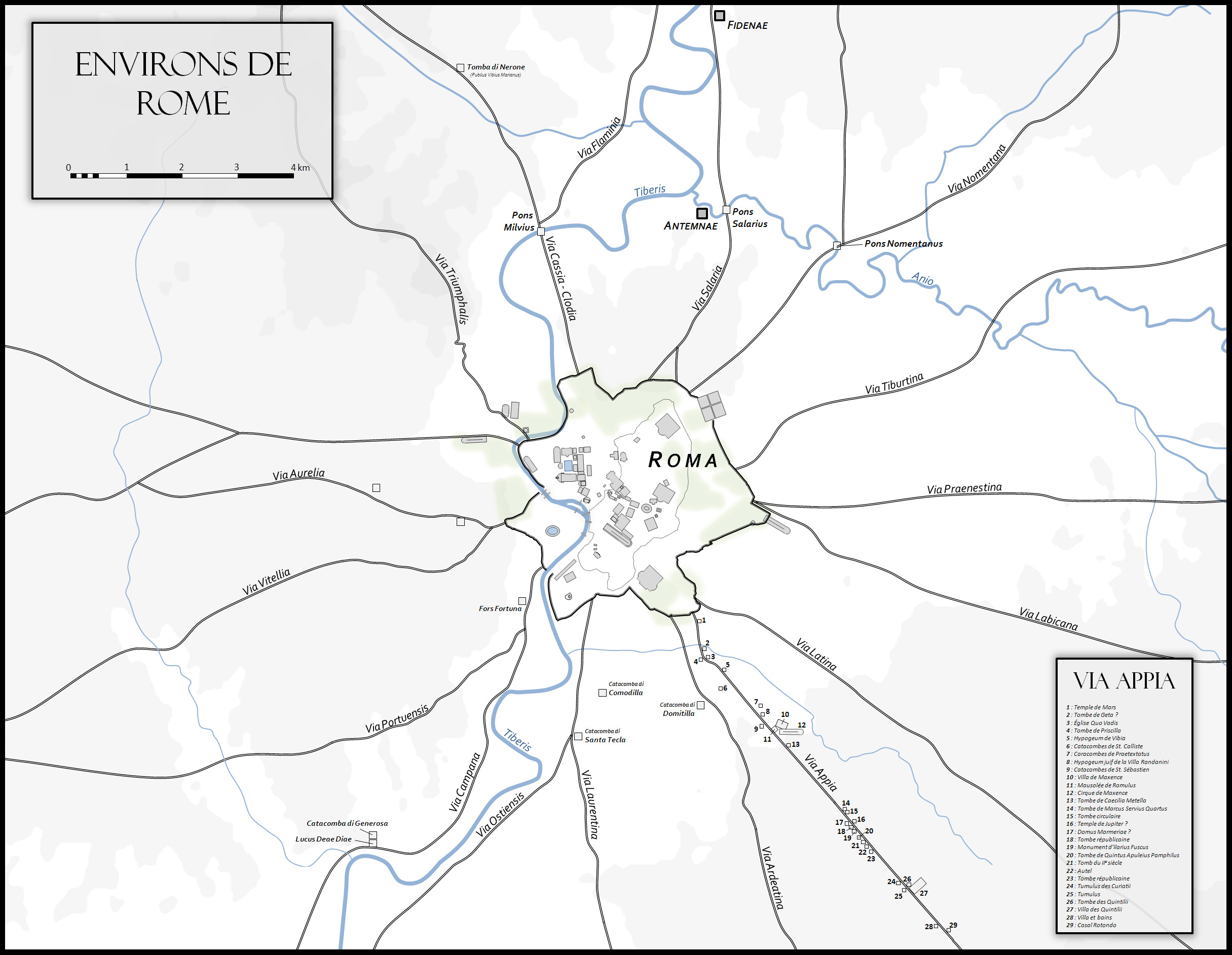 Carte des environs de Rome antique